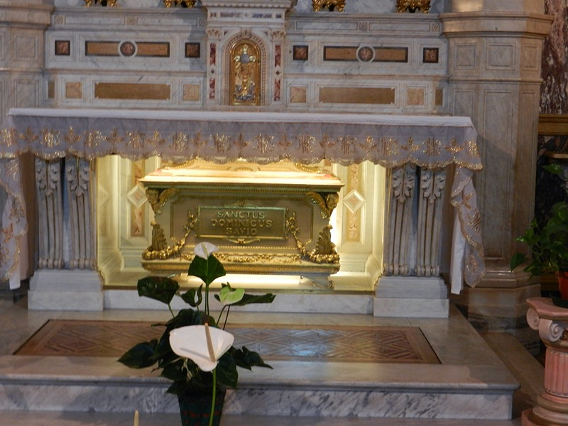 Torino - Tomba di S. Domenico Savio all'interno del Santuario di S. Maria Ausiliatrice